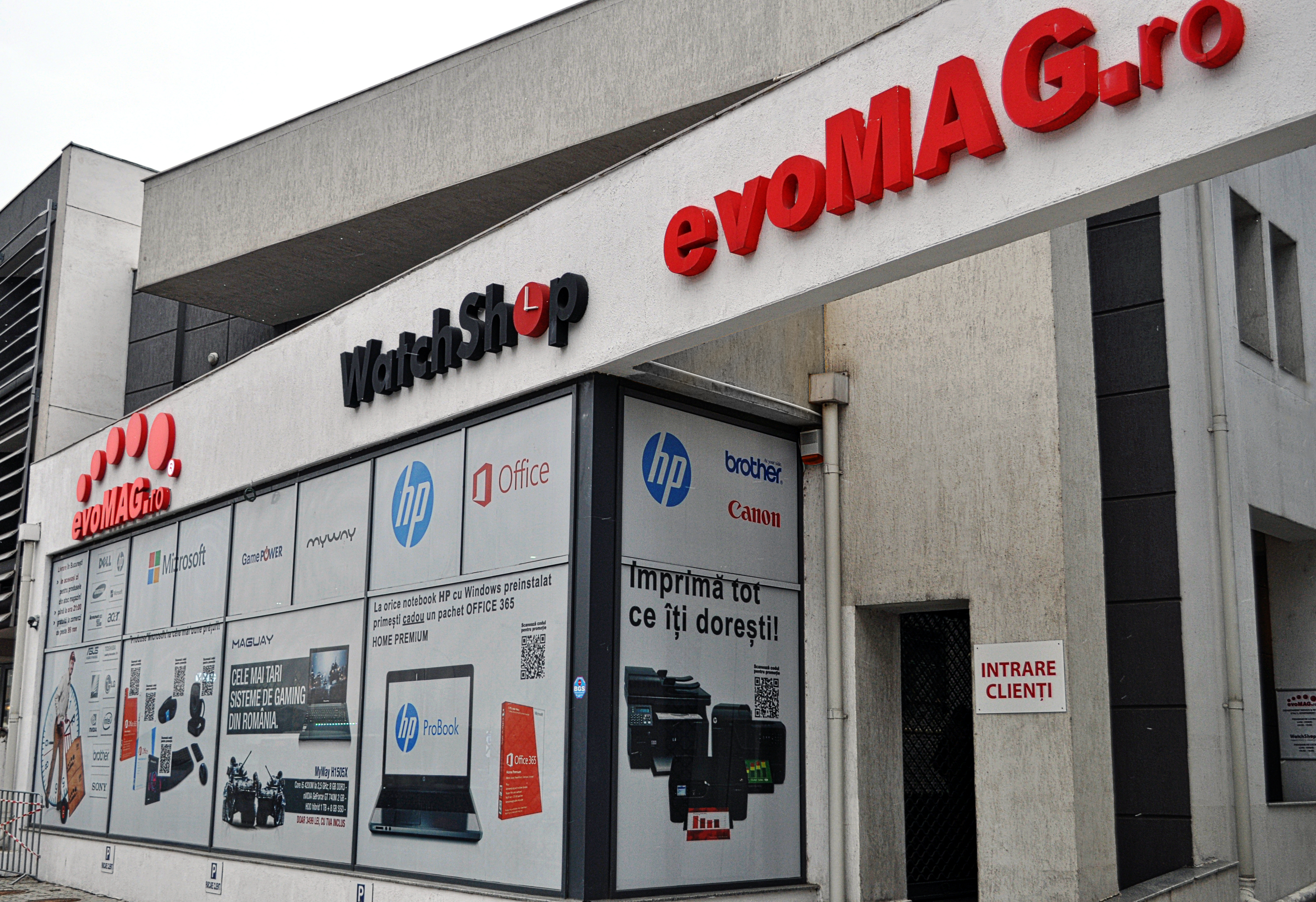 Showroomul evoMAG din Bucuresti